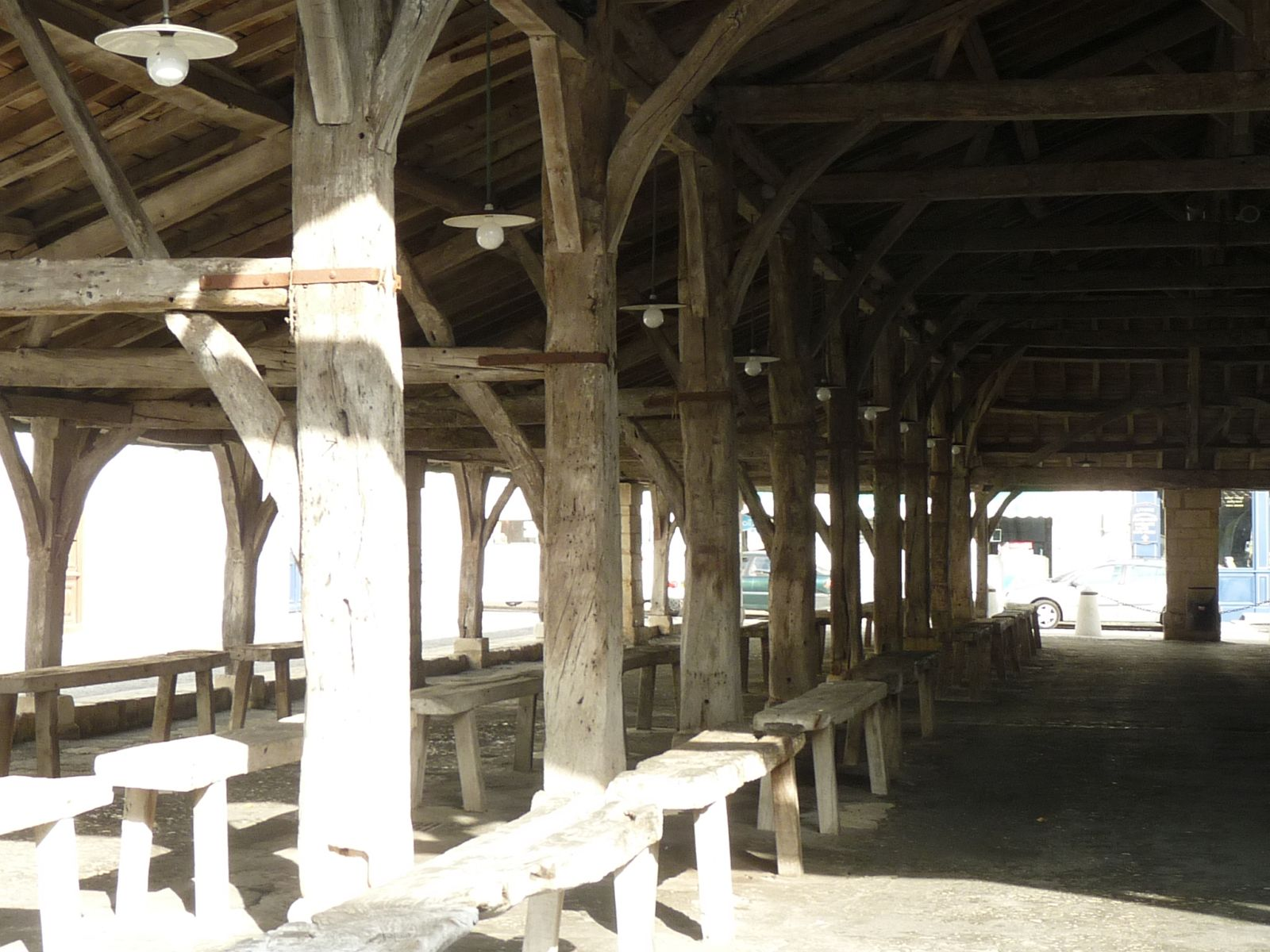 halles de Cozes (17), France